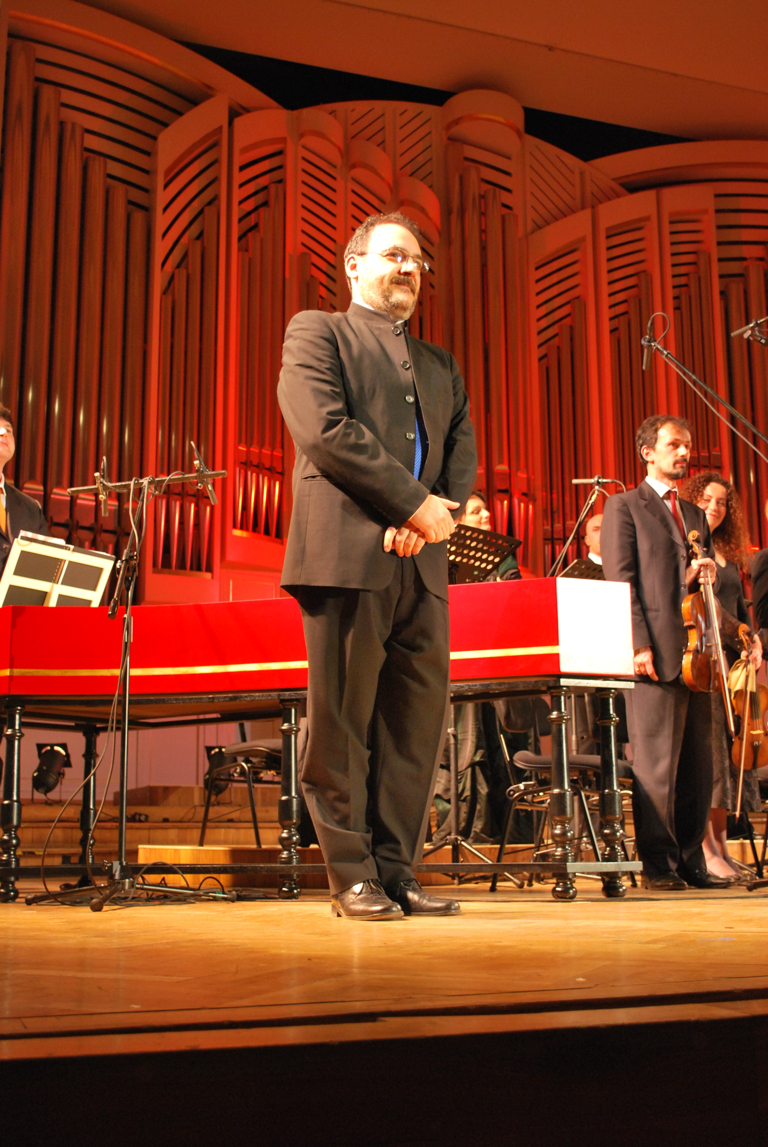 Rinaldo Alessandrini razem z zespołem Concerto Italiano podczas koncertu w Filharmonii Krakowskiej w ramach festiwalu Misteria Paschalia, 6 kwietnia 2009.